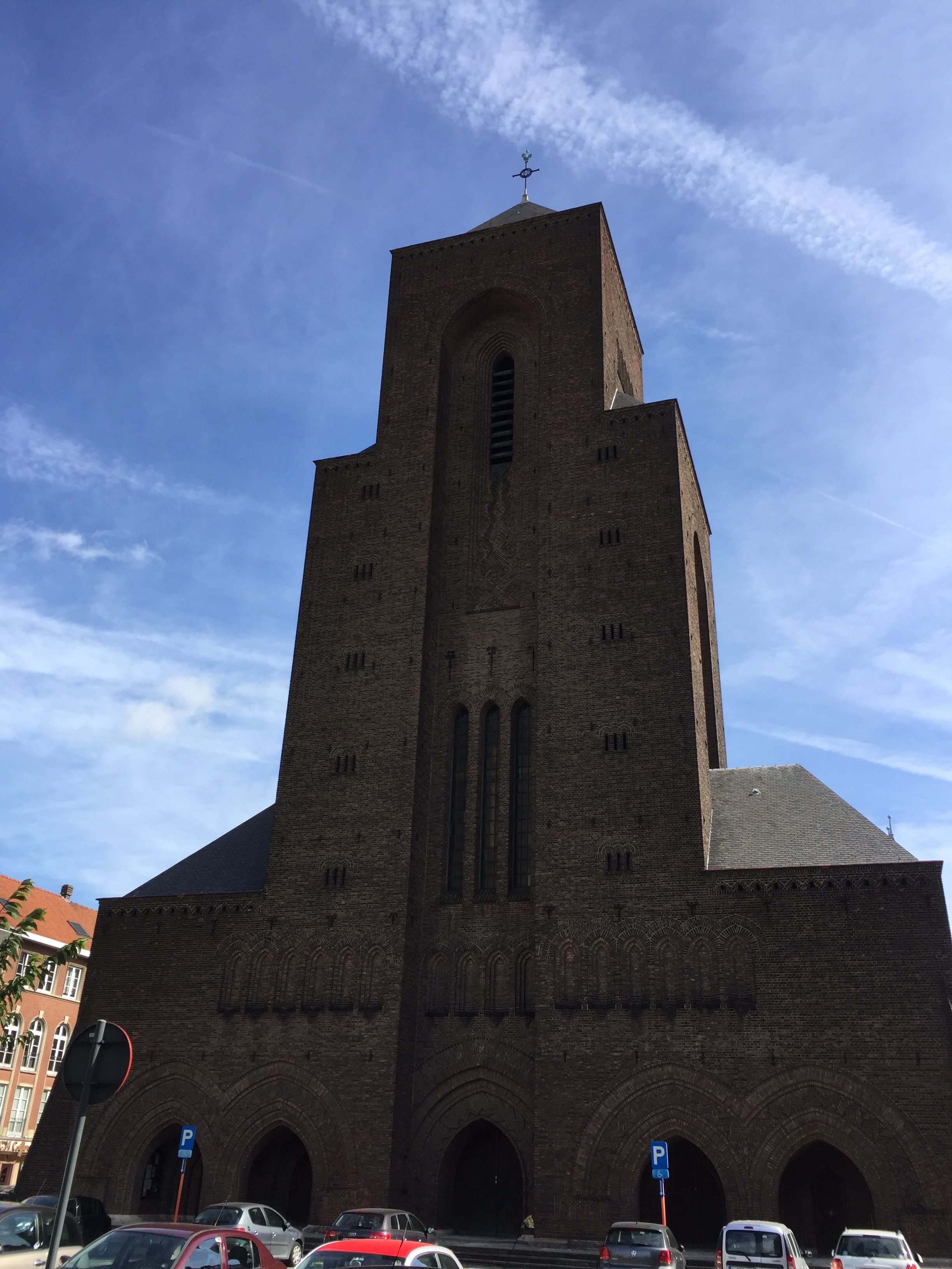 Eglise Saint-adrien (Bruxelles)2